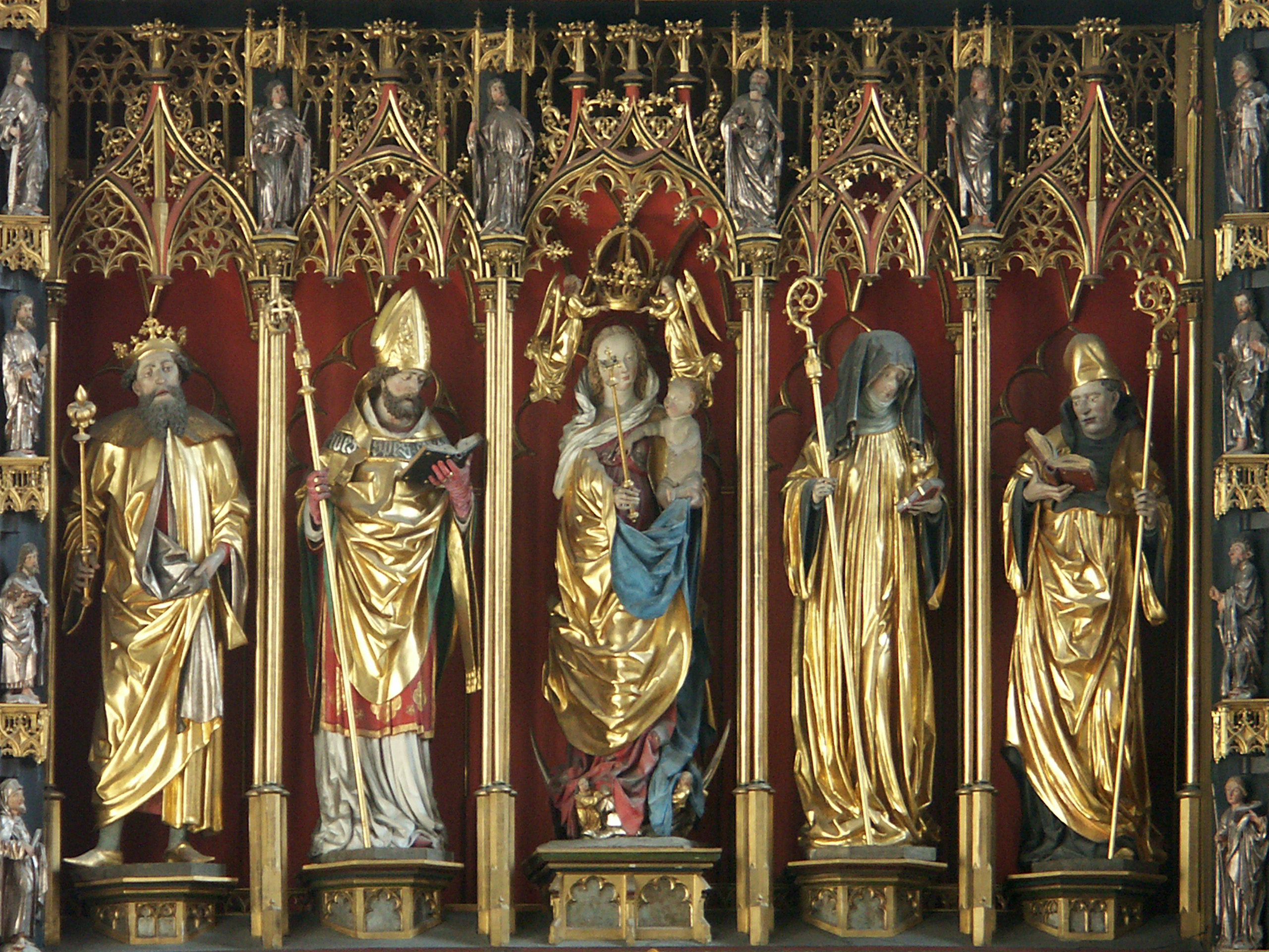 Dom zu Eichstätt, Mittelschrein des Hochaltars im Ostchor. Gottesmutter mit dem Kind, St. Willibald und Walburga, Richard und Wunibald